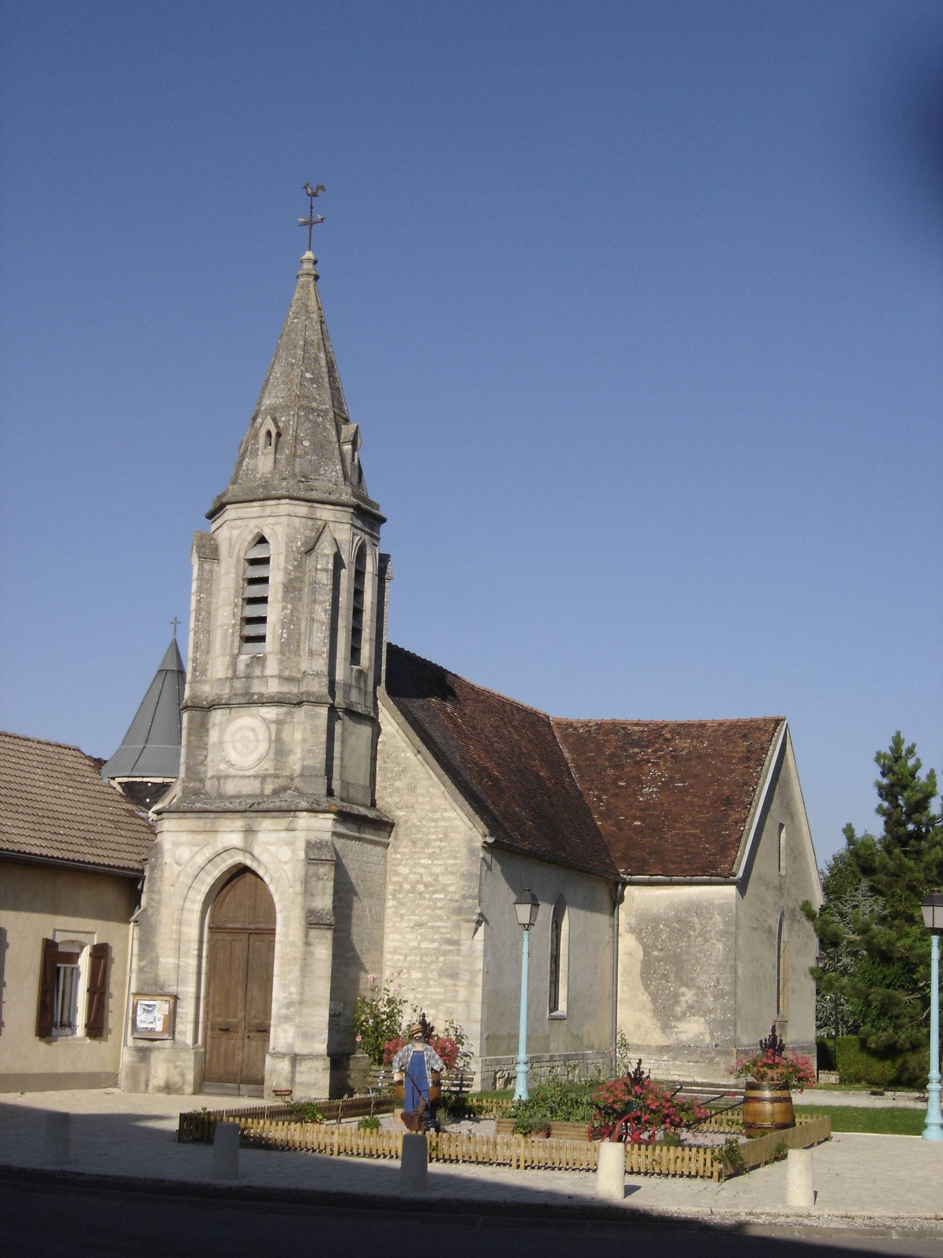 église Saint-Léger - Dolancourt - Aube - France